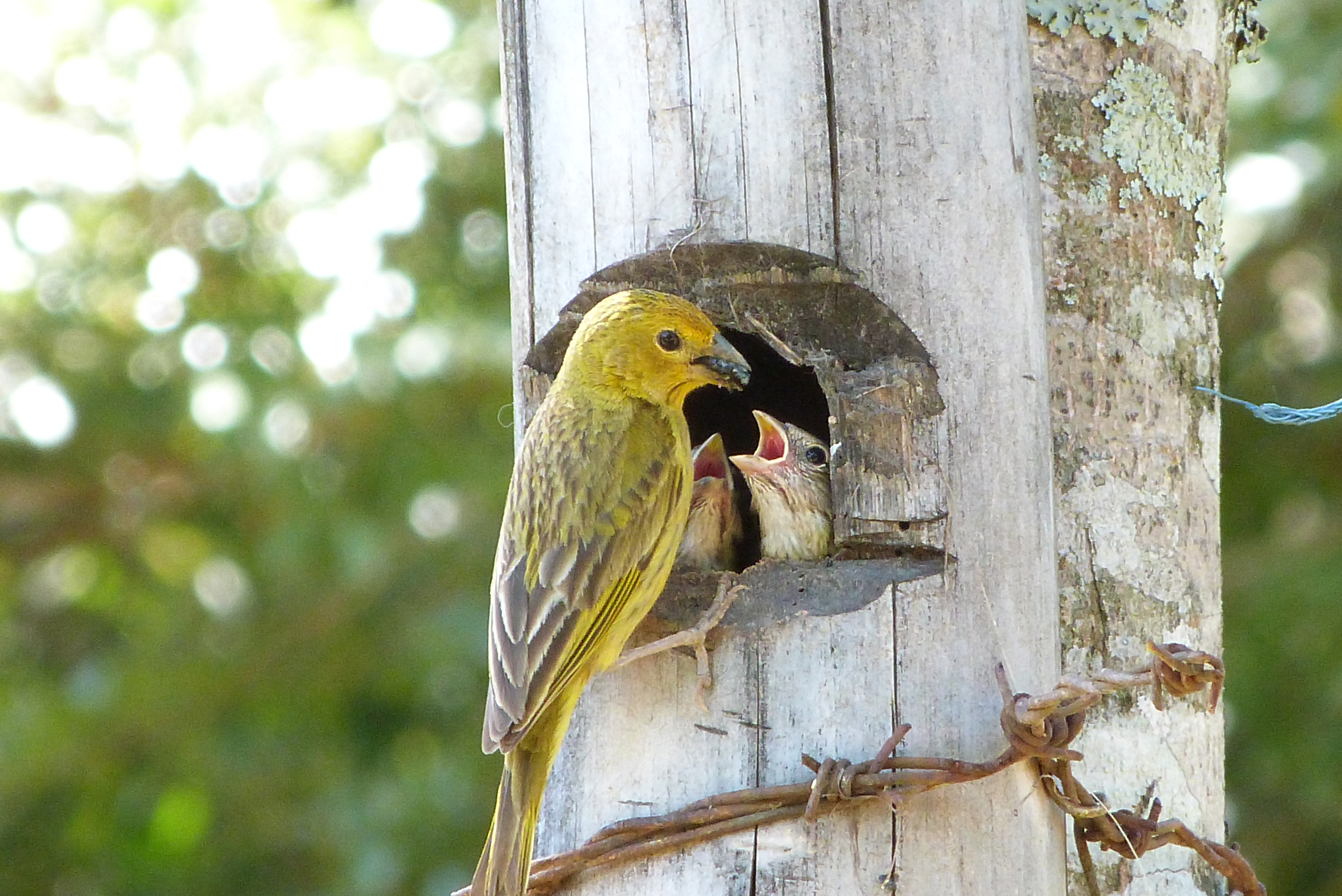 Foto tirada em Entre Rios - MG